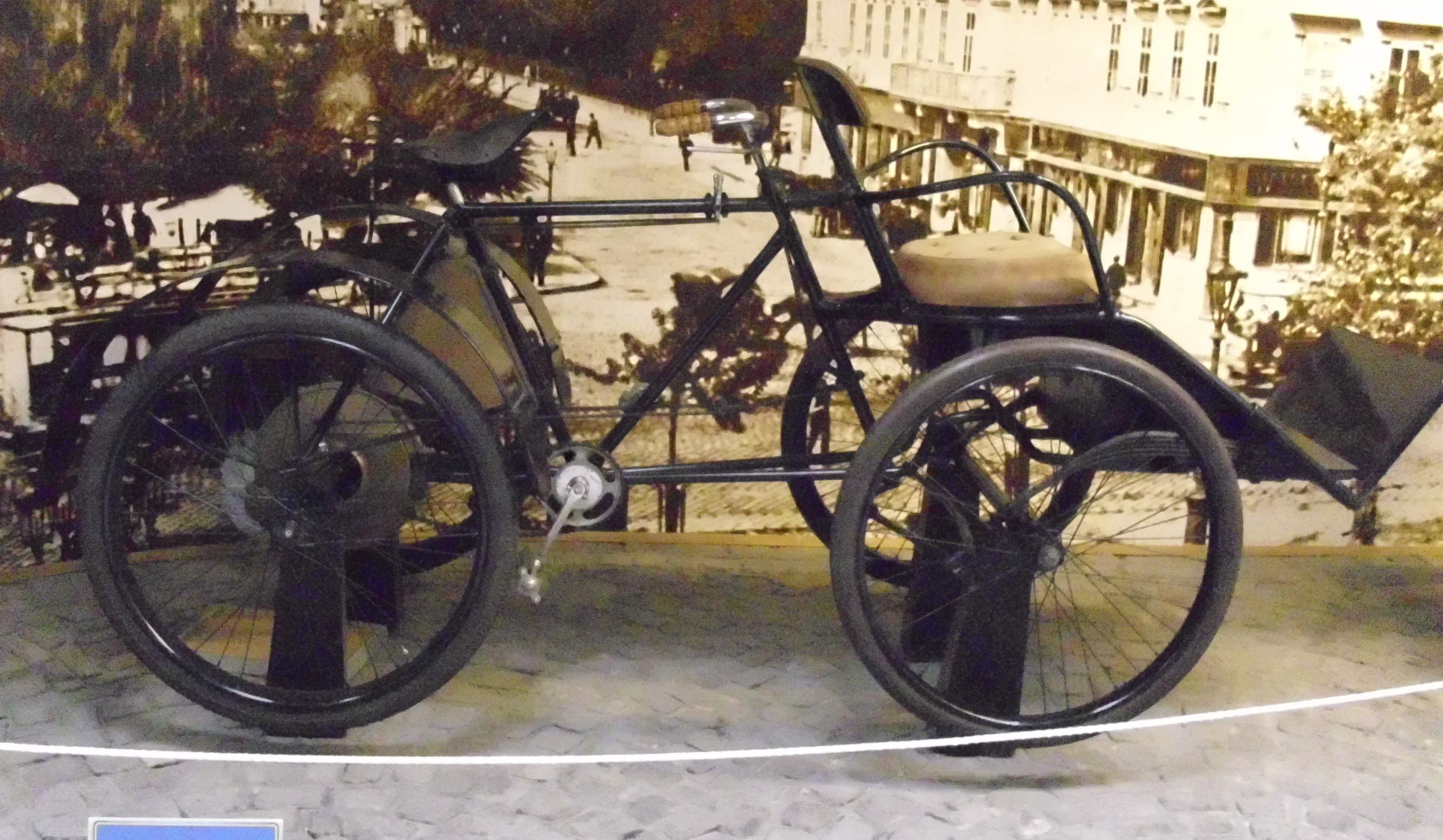 Aurore Quadricycle 1902 im Transportmuseum Budapest